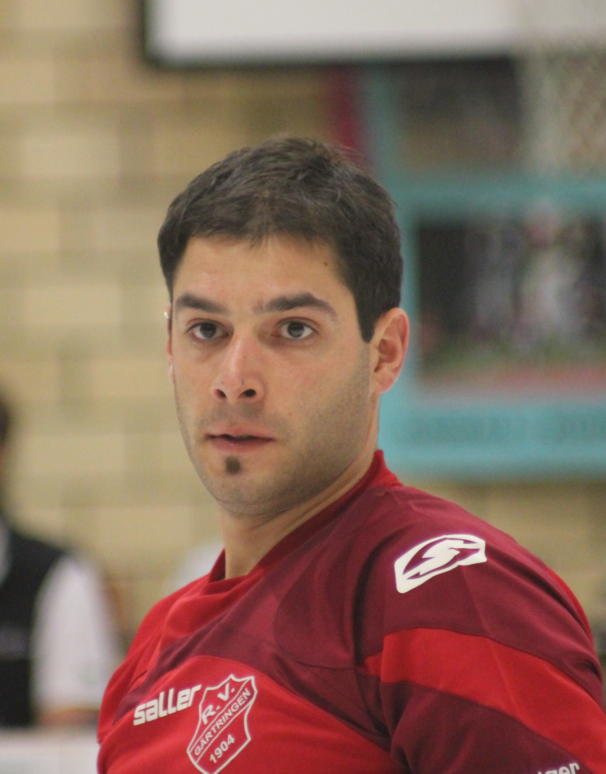 Matthias König beim Radball-Weltcup 2011 in St. Gallen